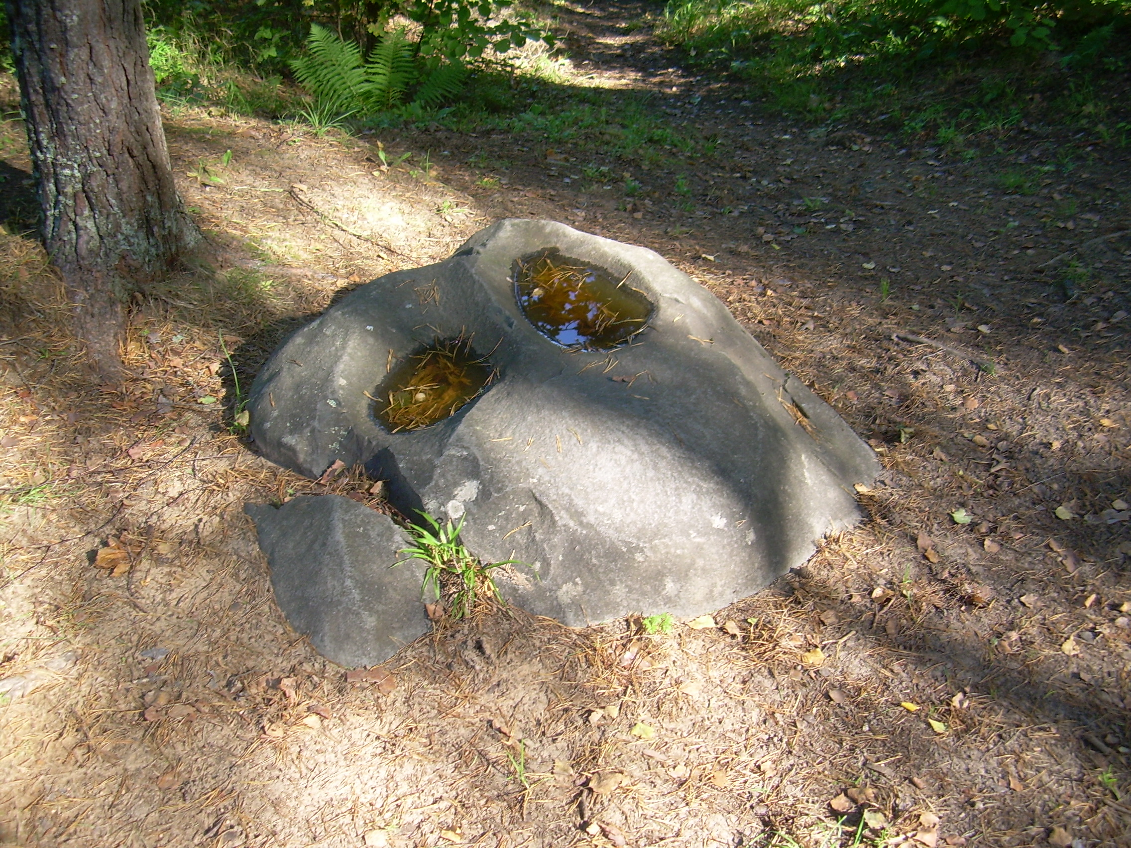 Helme alevik, Jõgeri